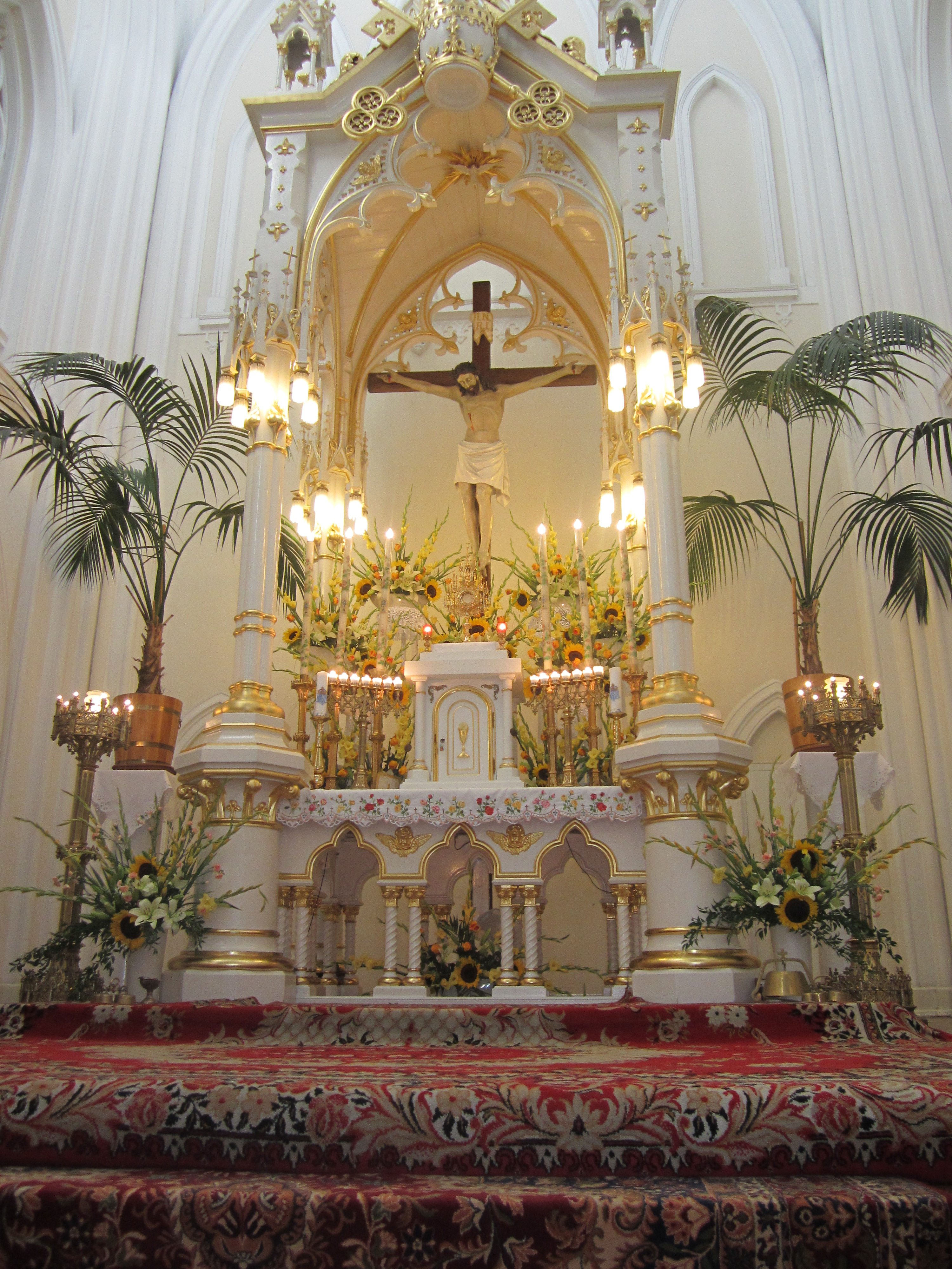 Ołtarz w katedrze mariawickiej w Płocku